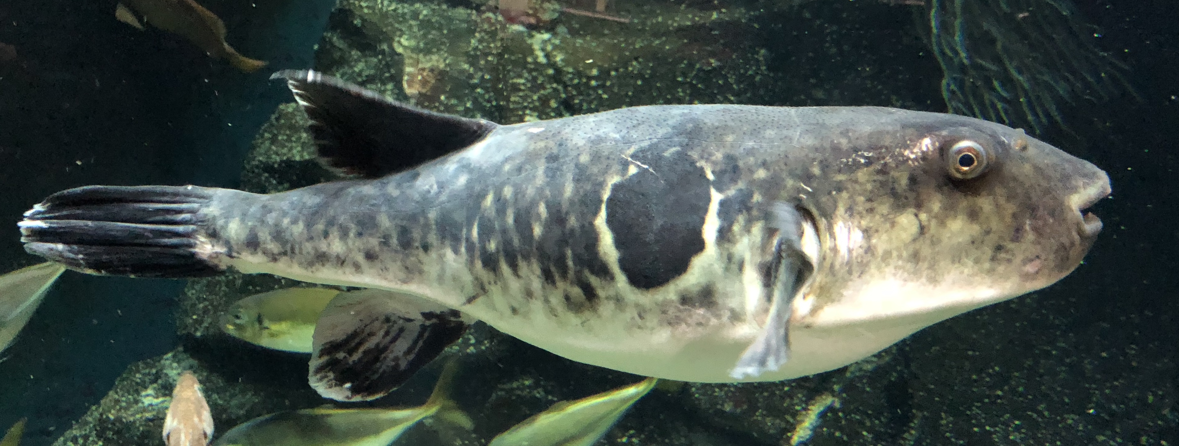 トラフグ。鶴岡市立加茂水族館飼育個体。